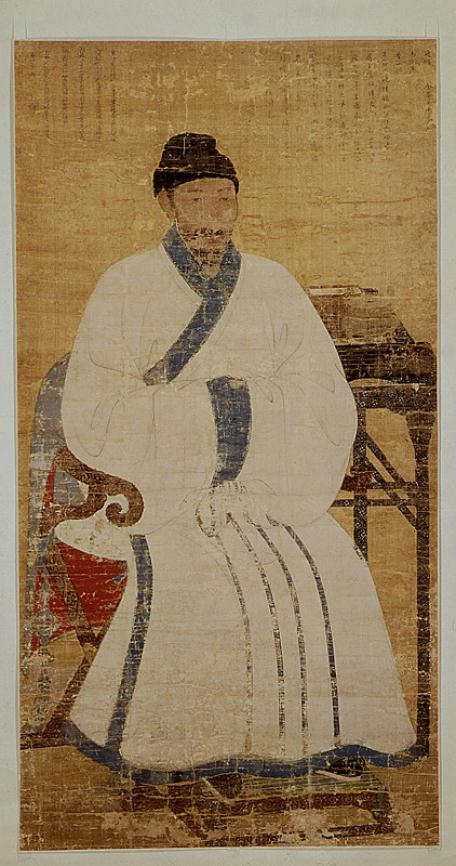 국보.110호 익재영정 고려, 국립중앙박물관 소장